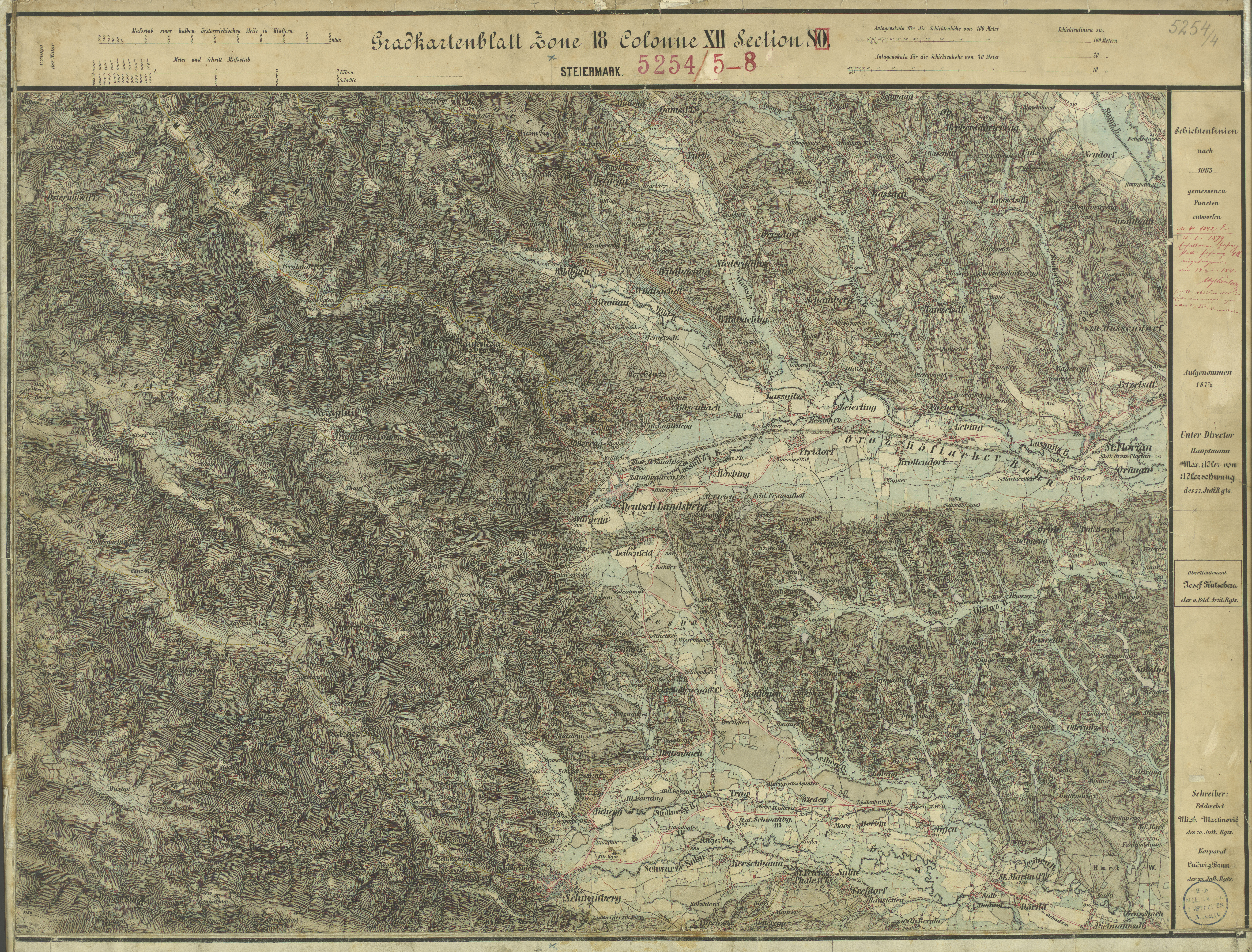 historische Landkarte: Gradkartenblatt Zone 18 Colonne XII Section SO (später 5254/4). Deutschlandsberg, Schwanberg, Osterwitz. Franzisco-josephinische (3.) Landesaufnahme der österreichisch-ungarischen Monarchie. Aufnahmeblatt 1:25.000. Aufgenommen 1877/78